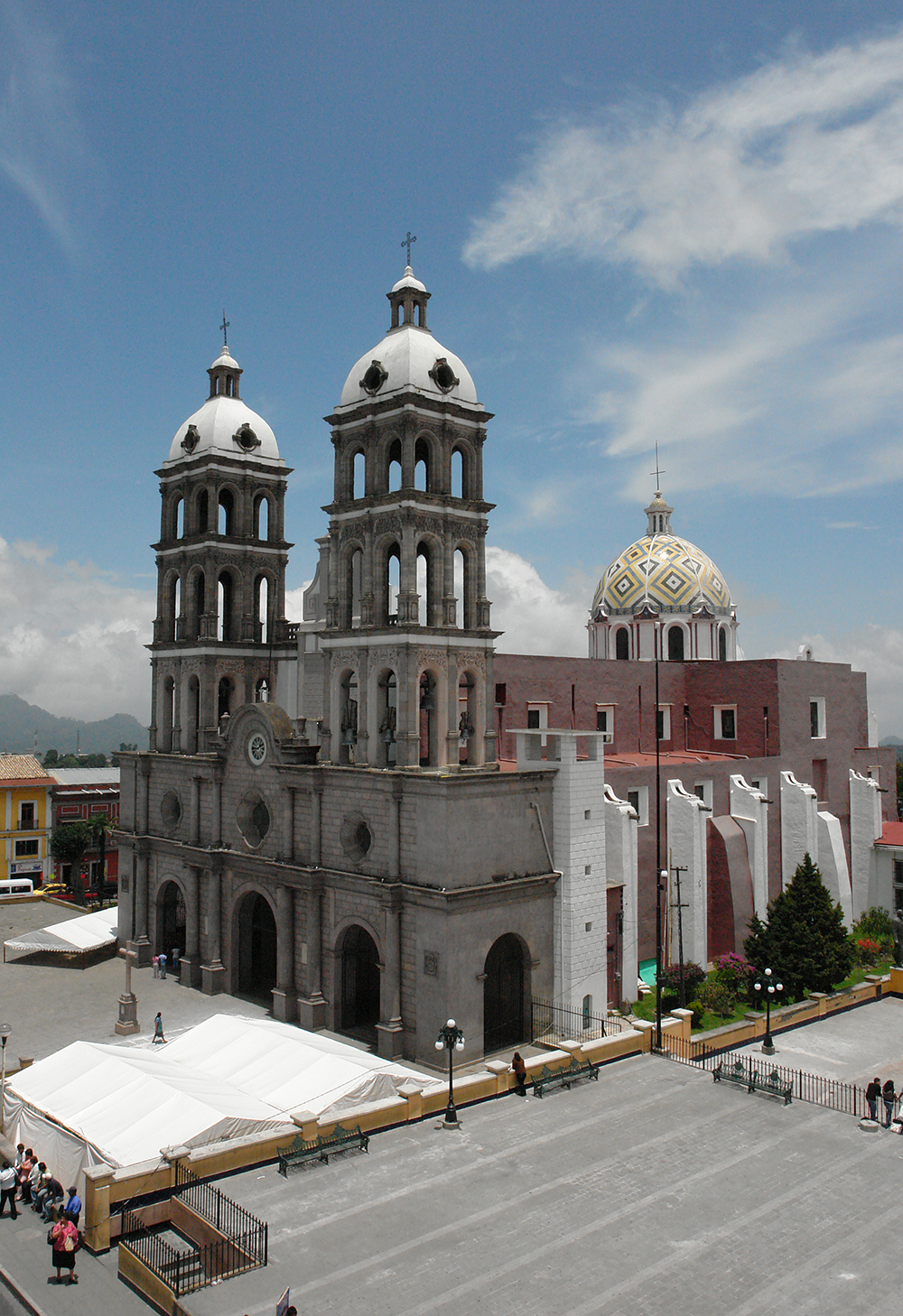 Templo